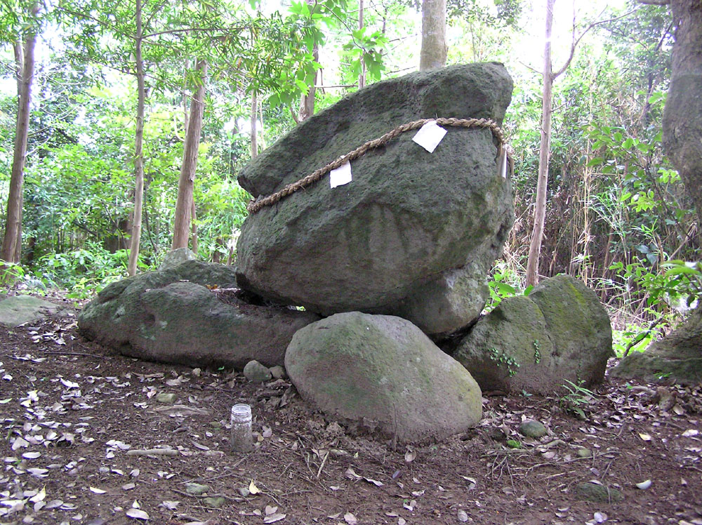 磐境の中のドルメン（支石墓）